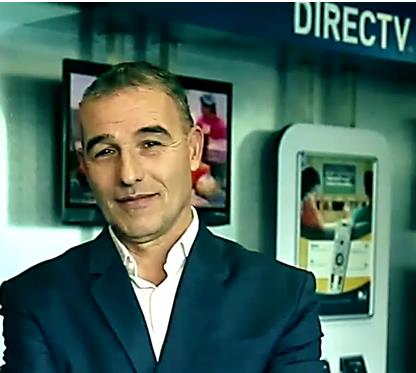 Adrián Magnoli